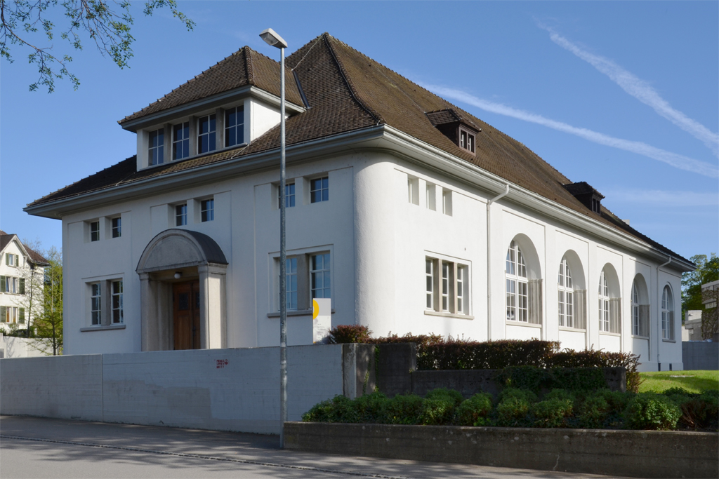 Kantonsschule Schaffhausen, Alte Turnhalle